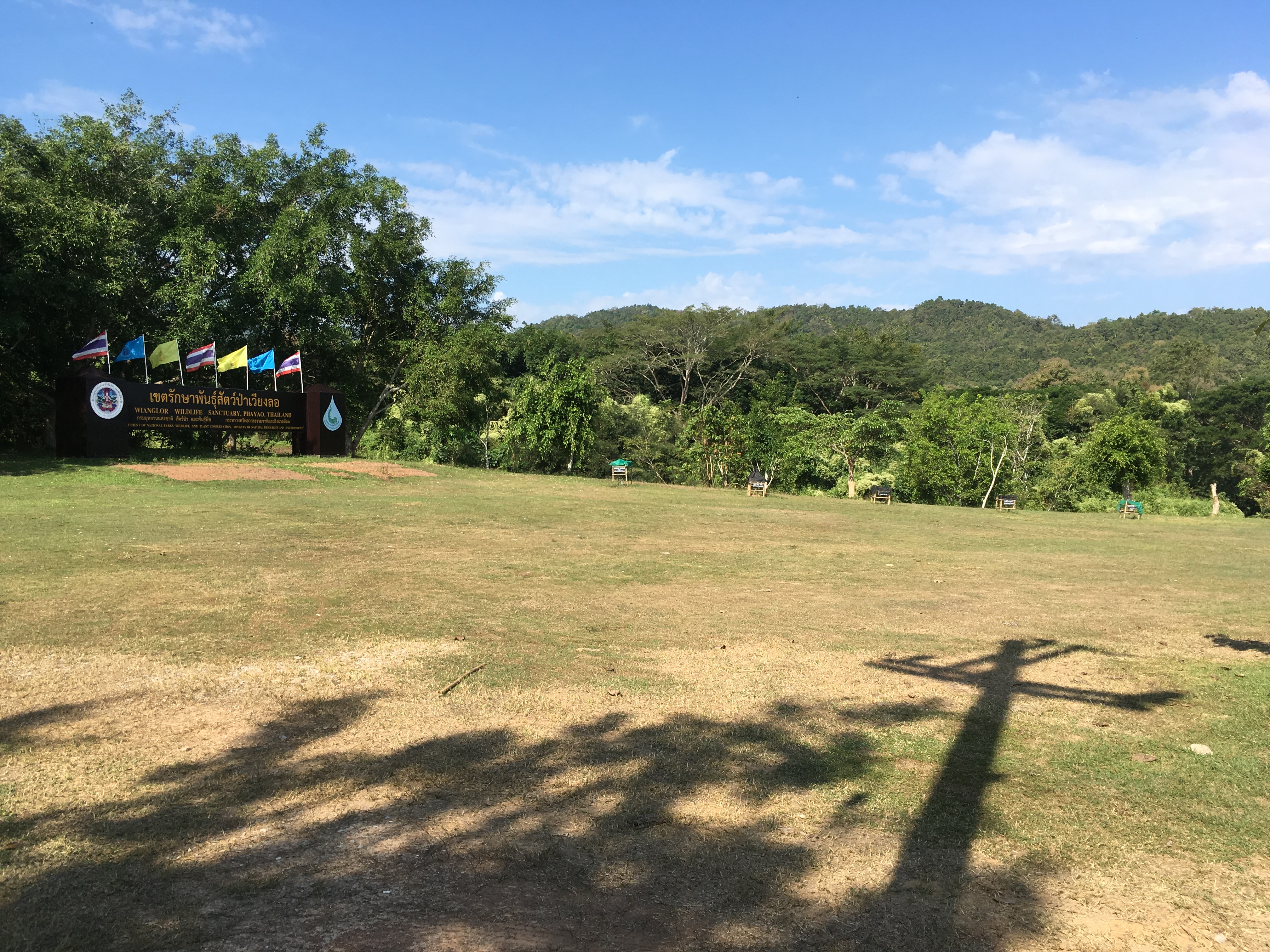 เขตรักษาพันธุ์สัตว์ป่าเวียงลอ